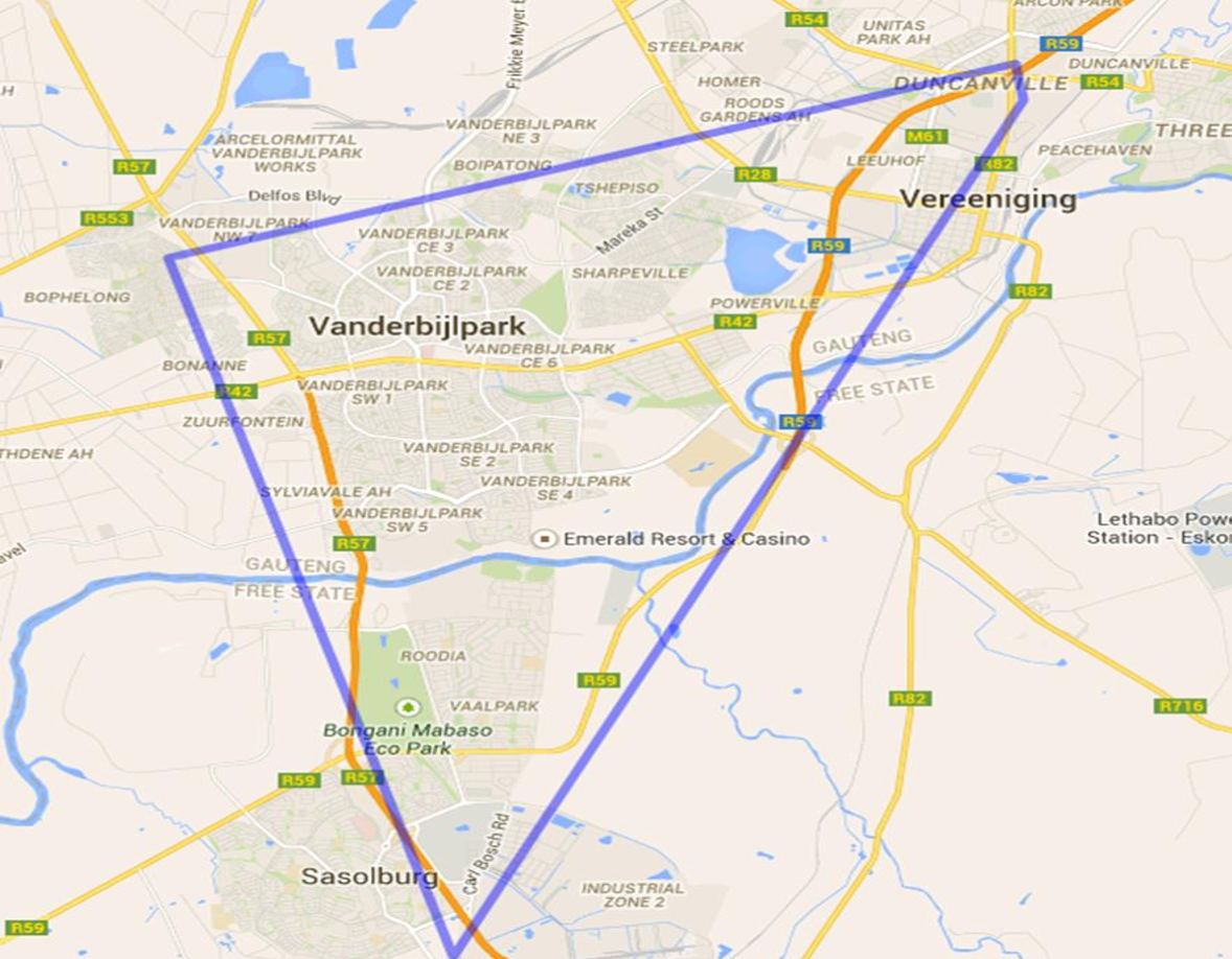 Carte de la région du Triangle de Vaal montrant la démarcation géographique